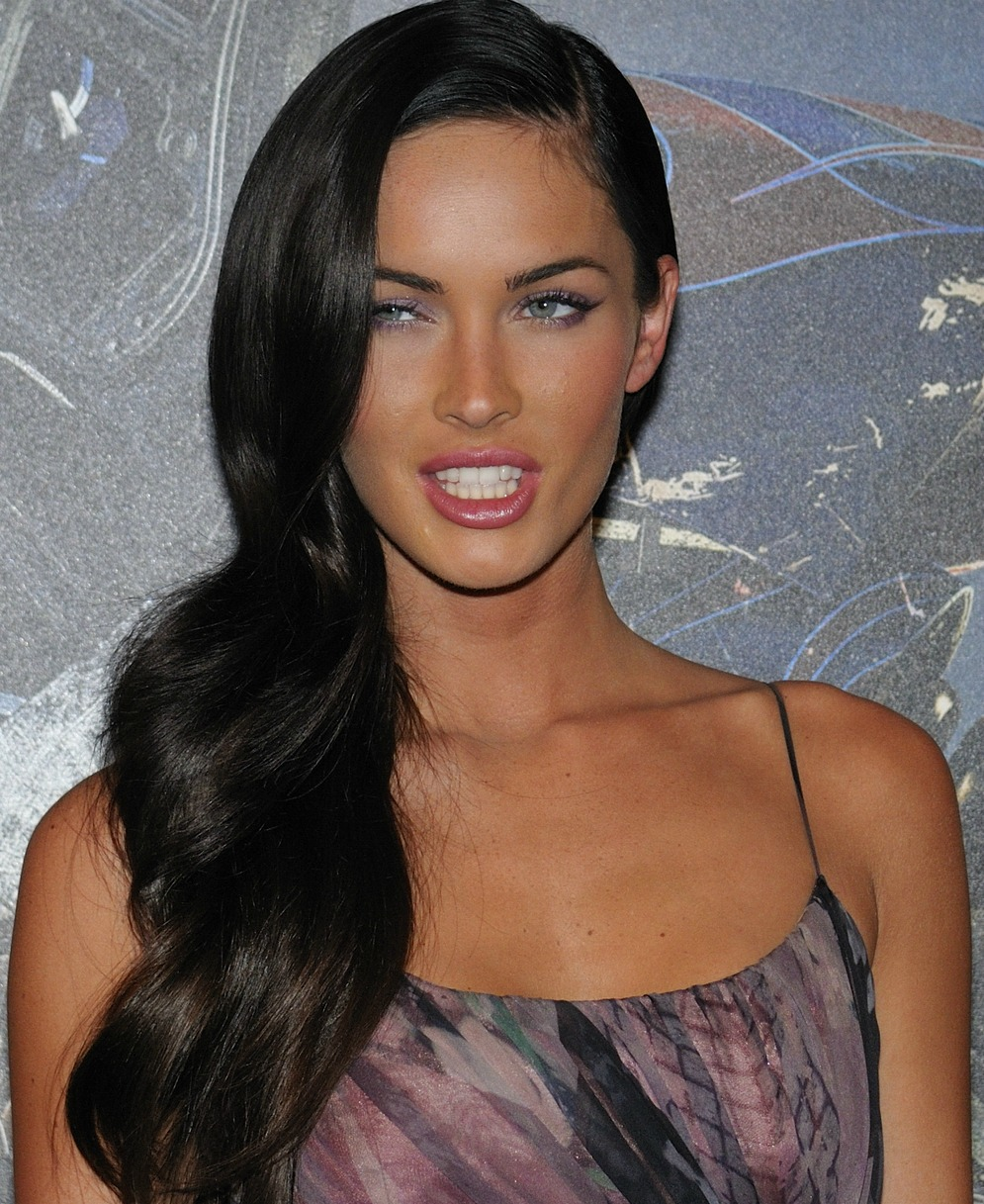 Megan Fox et Shia Labeouf au Georges V à Paris, pour la promo du film Transformers 2 : la revanche